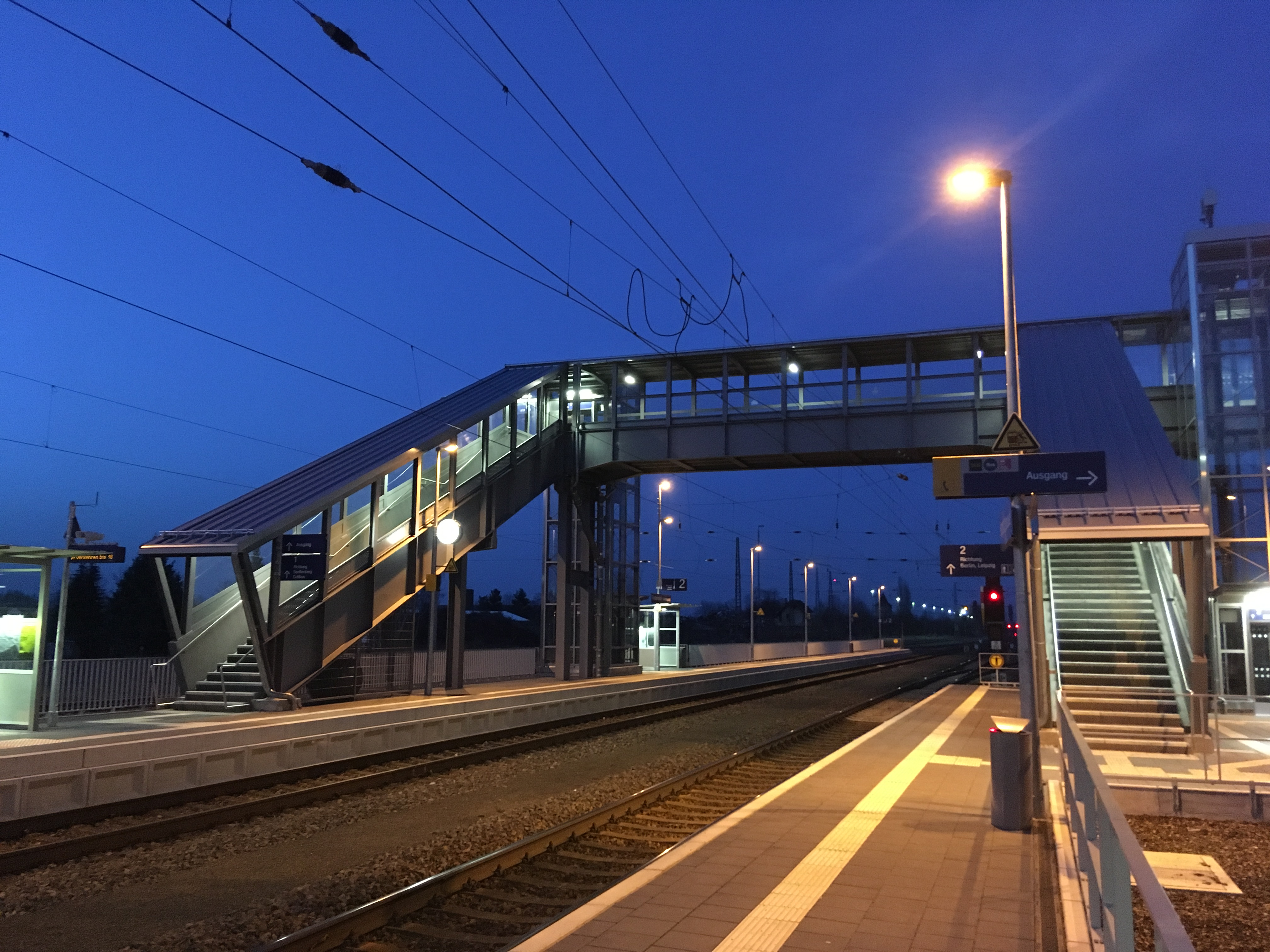 Nach der Umgestaltung im Jahr 2016 (April 2018)